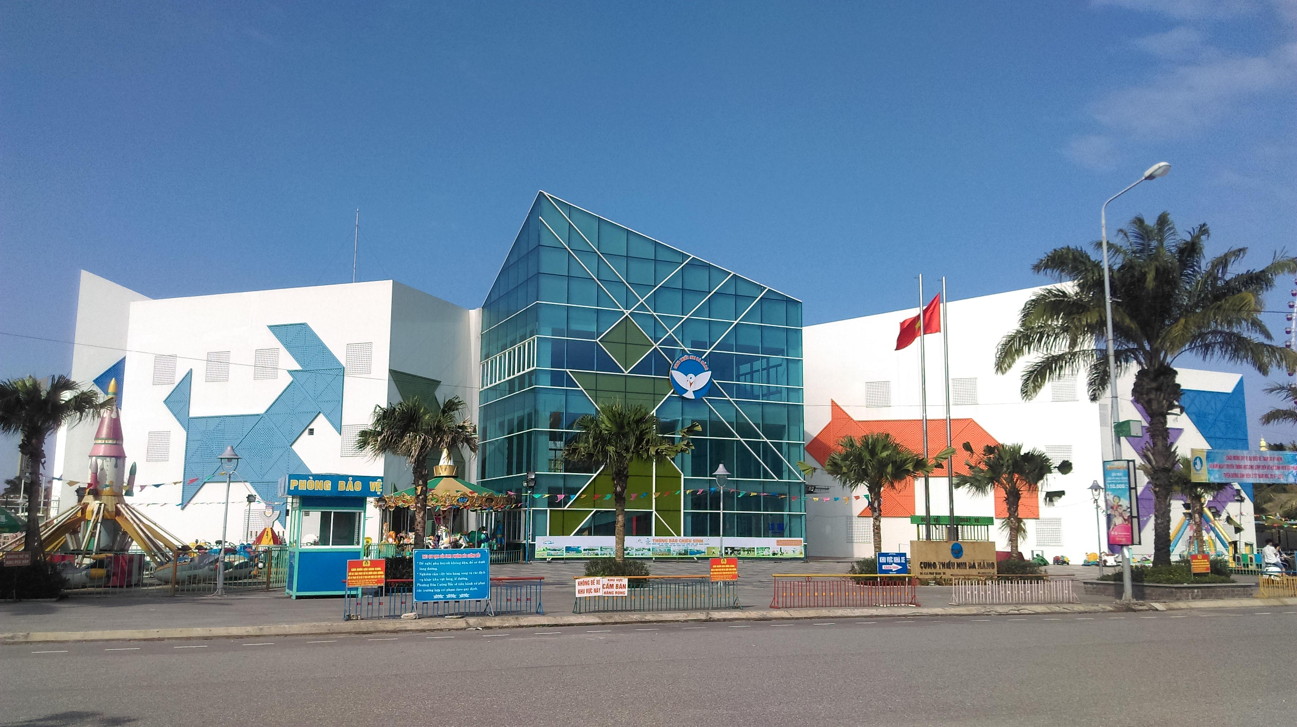 Cung Thiếu nhi Đà Nẵng